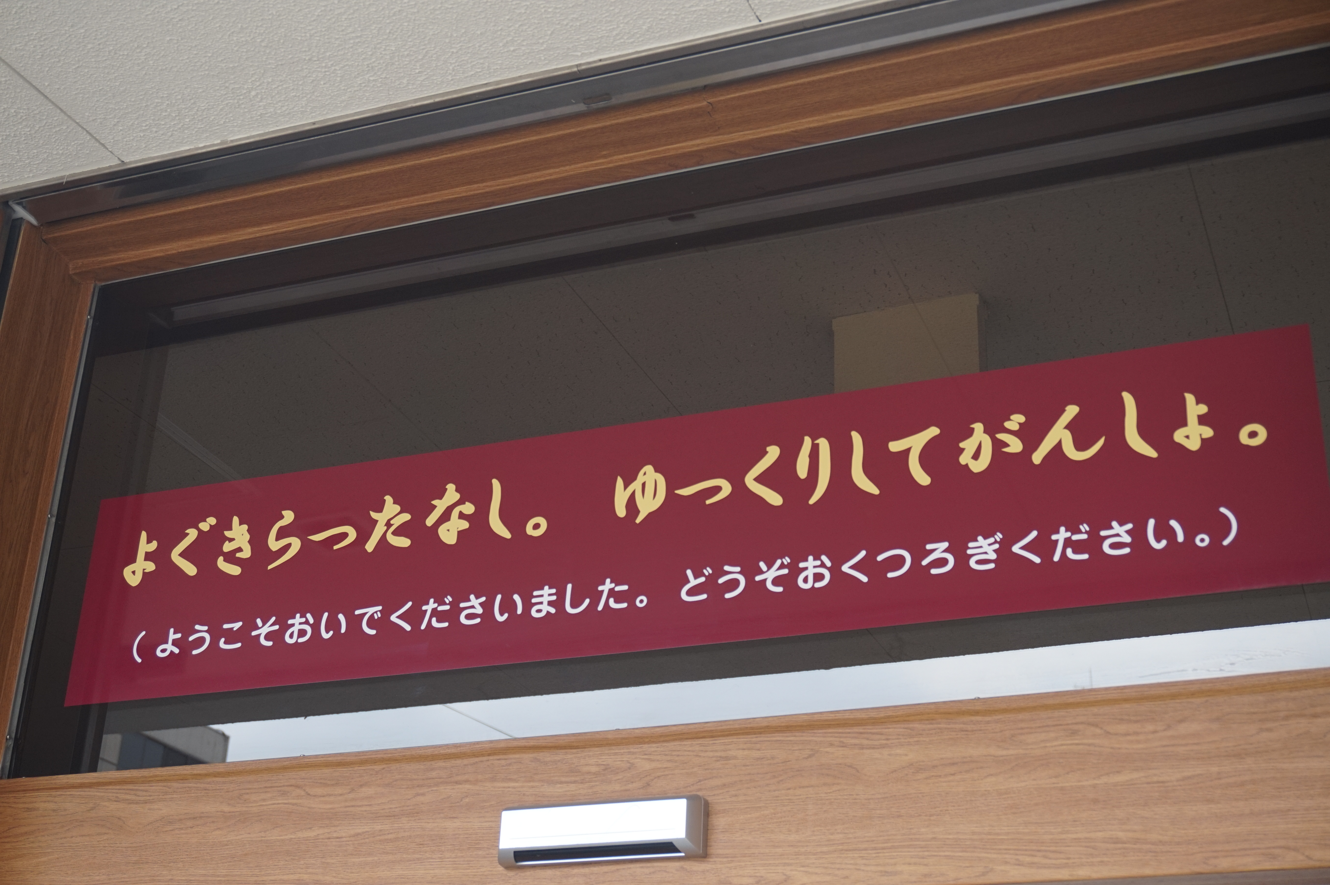 会津弁の一例。会津若松市内で撮影。